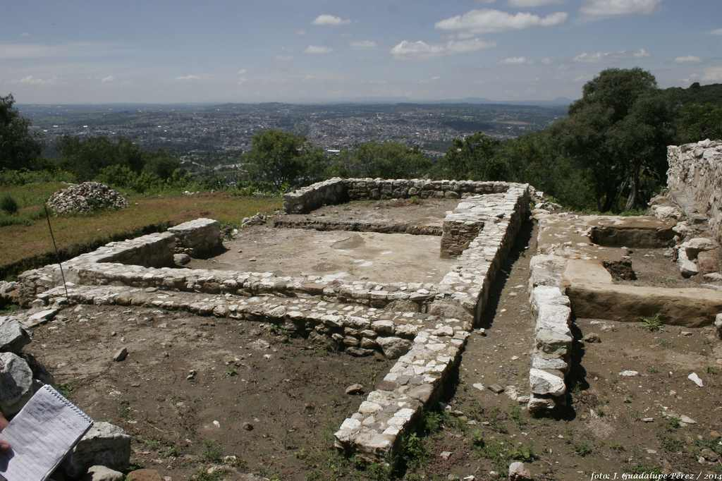 Totolac, Tlaxcala Foto: J. Guadalupe Pérez /2014